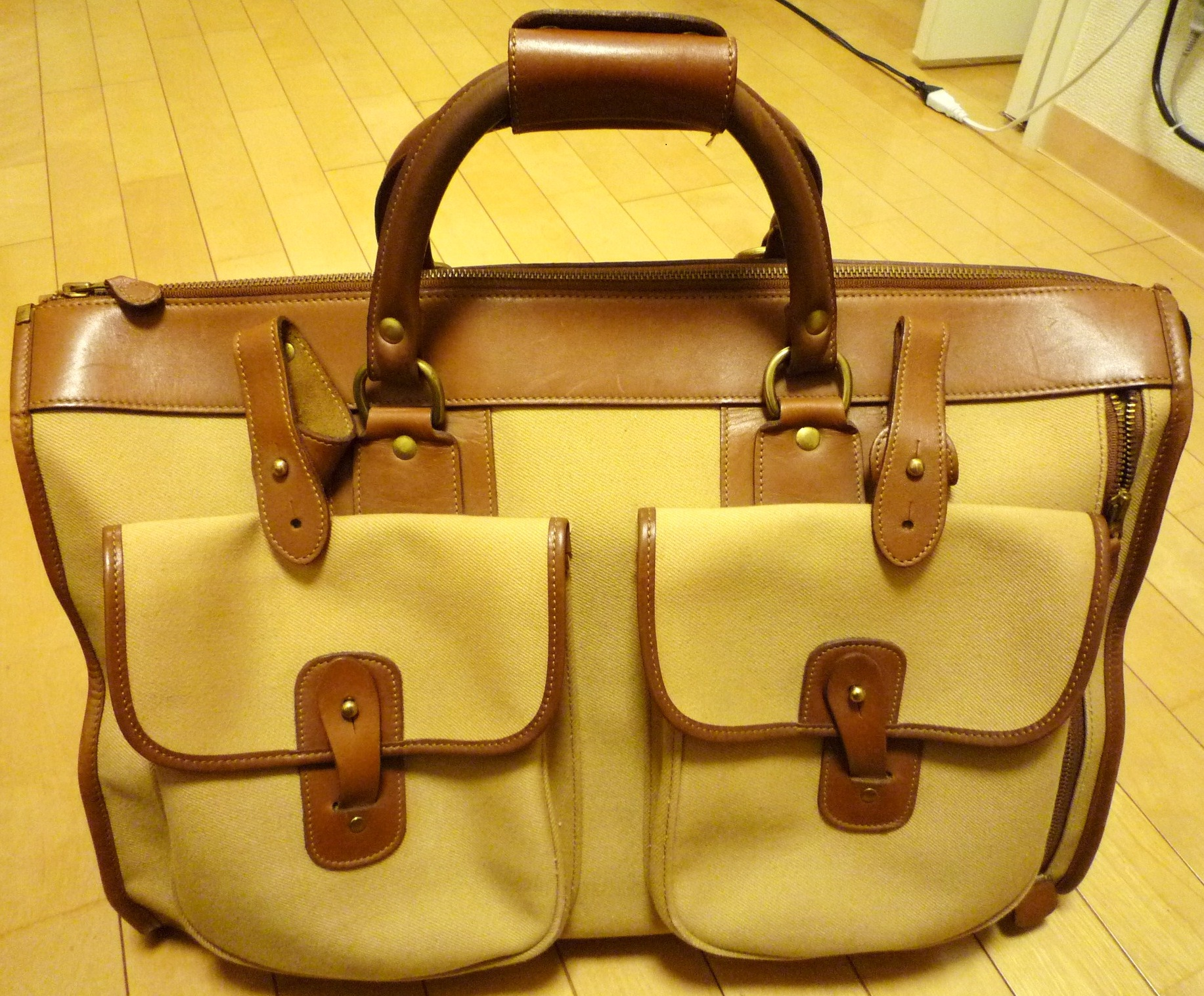 GHURKA-1